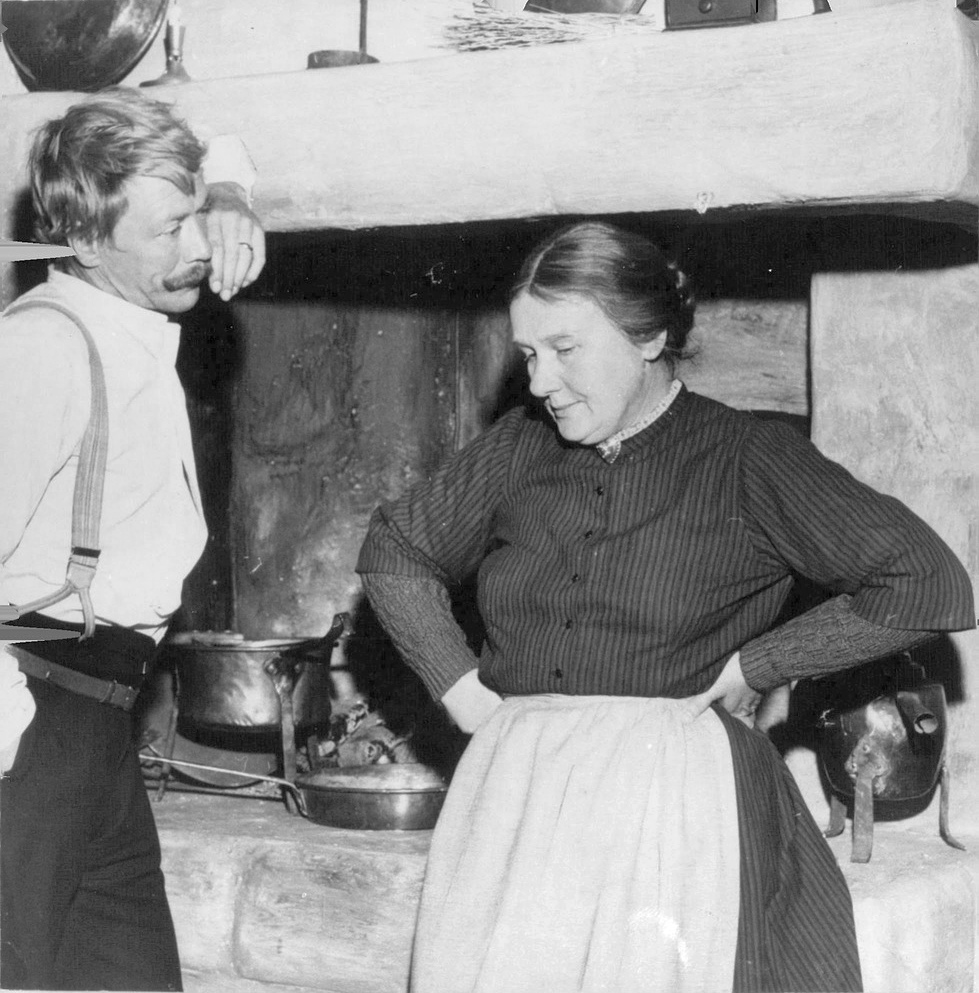 Allan Edwall och Sif Ruud i Hemsöborna.